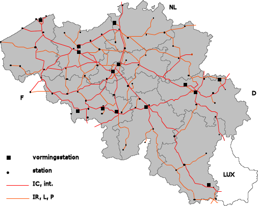 10 dec 2005